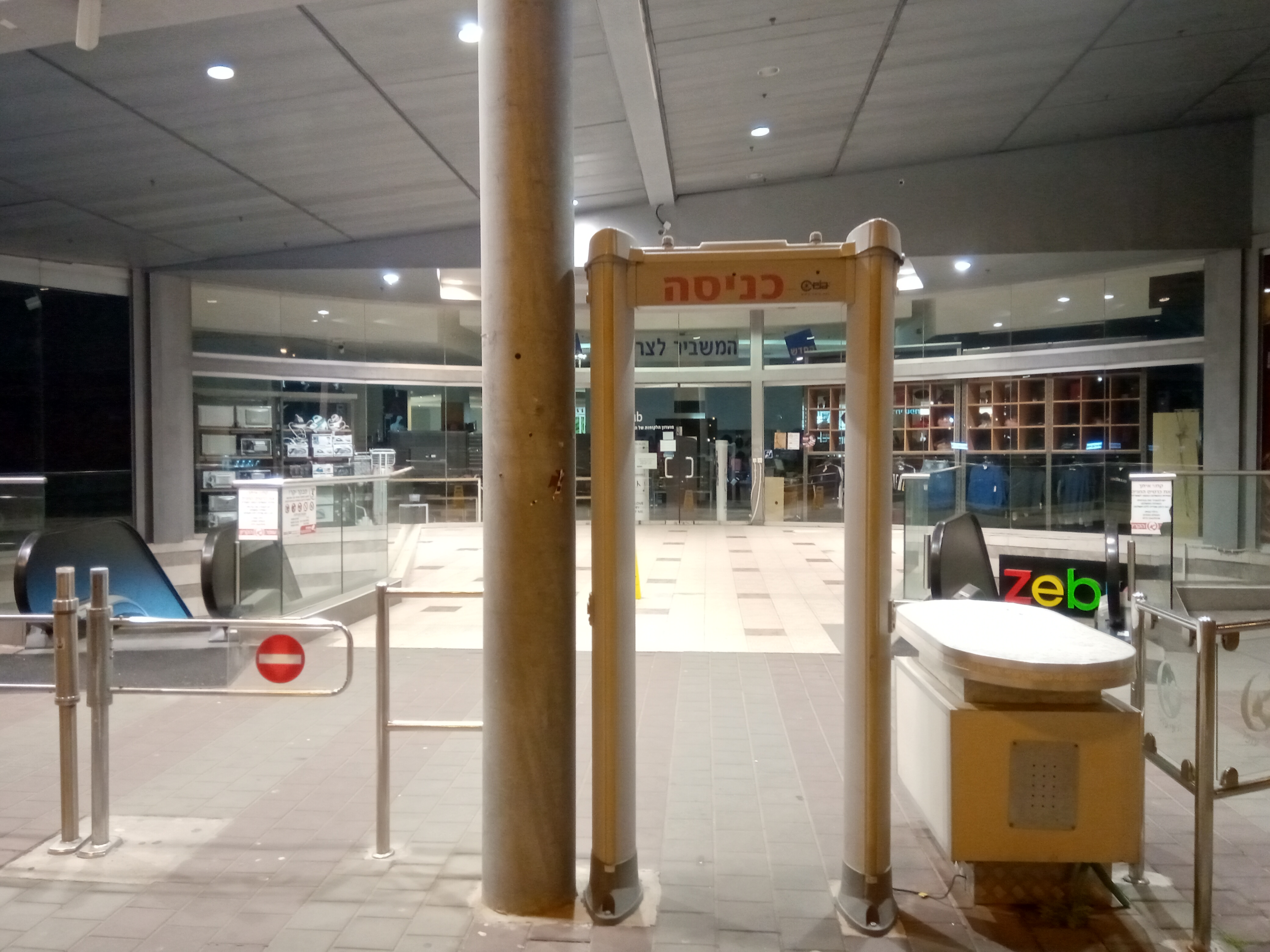 קניון סגור במוצאי שבת בעקבות מתן ההוראה על סגירת מרכזי קניות